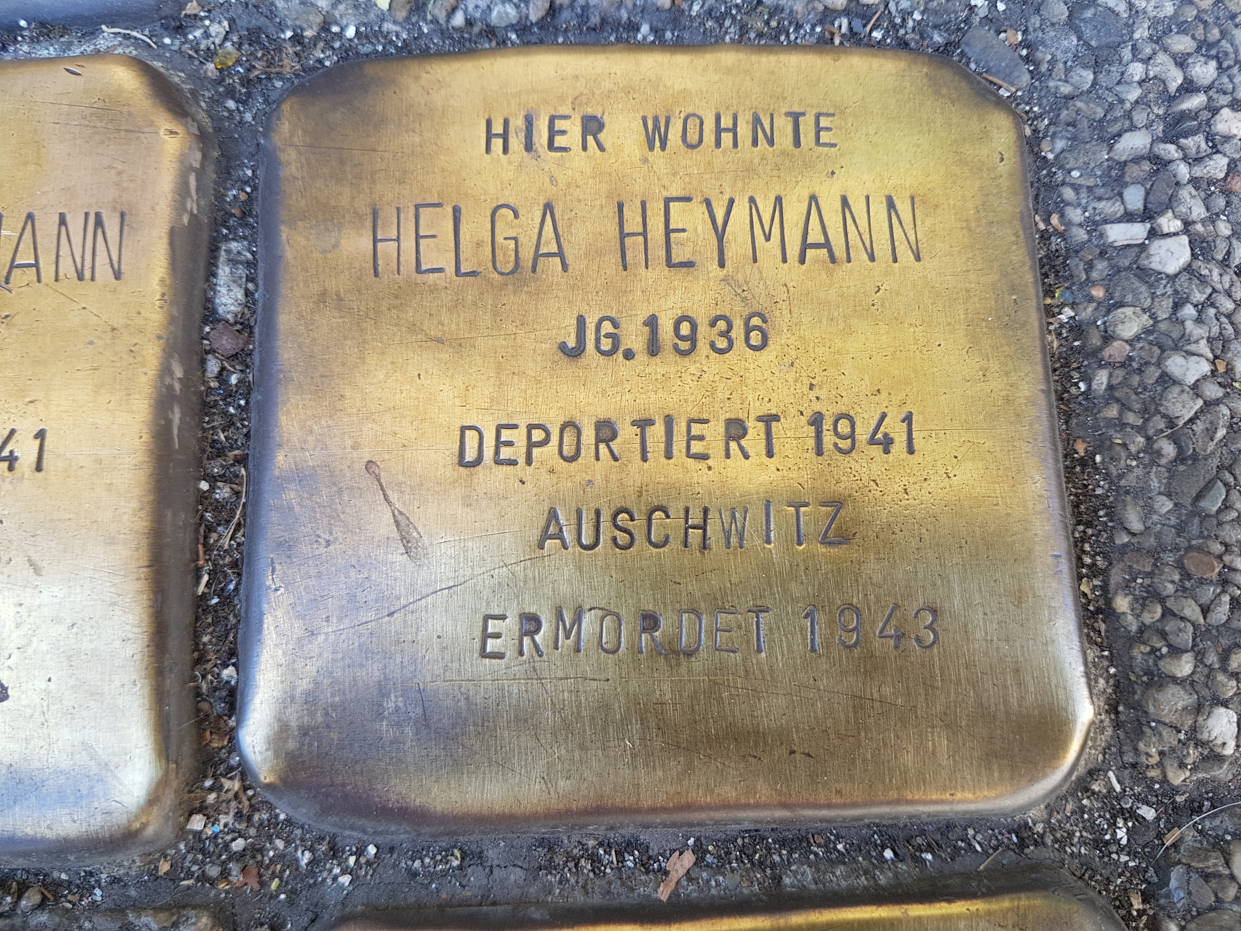 Stolperstein Duisburg Helga Heymann